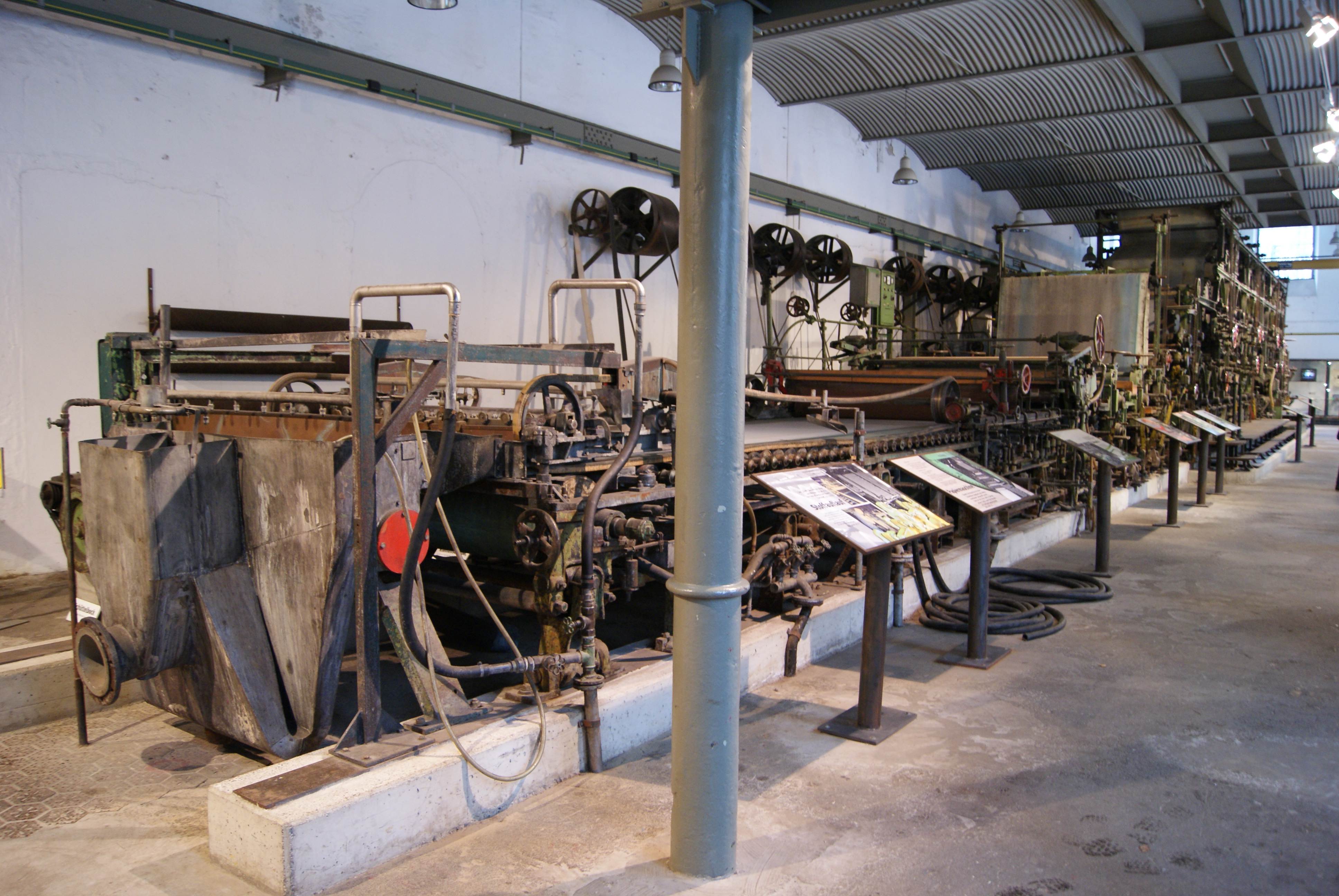 Die Zanders-Papiermaschine 4 (PM 4), in Betrieb 1889 - 1991, ausgestellt im Maschinenraum Neue Dombach des LVR-Industriemuseums Berg. Gladbach (Papiermuseum Alte Dombach)